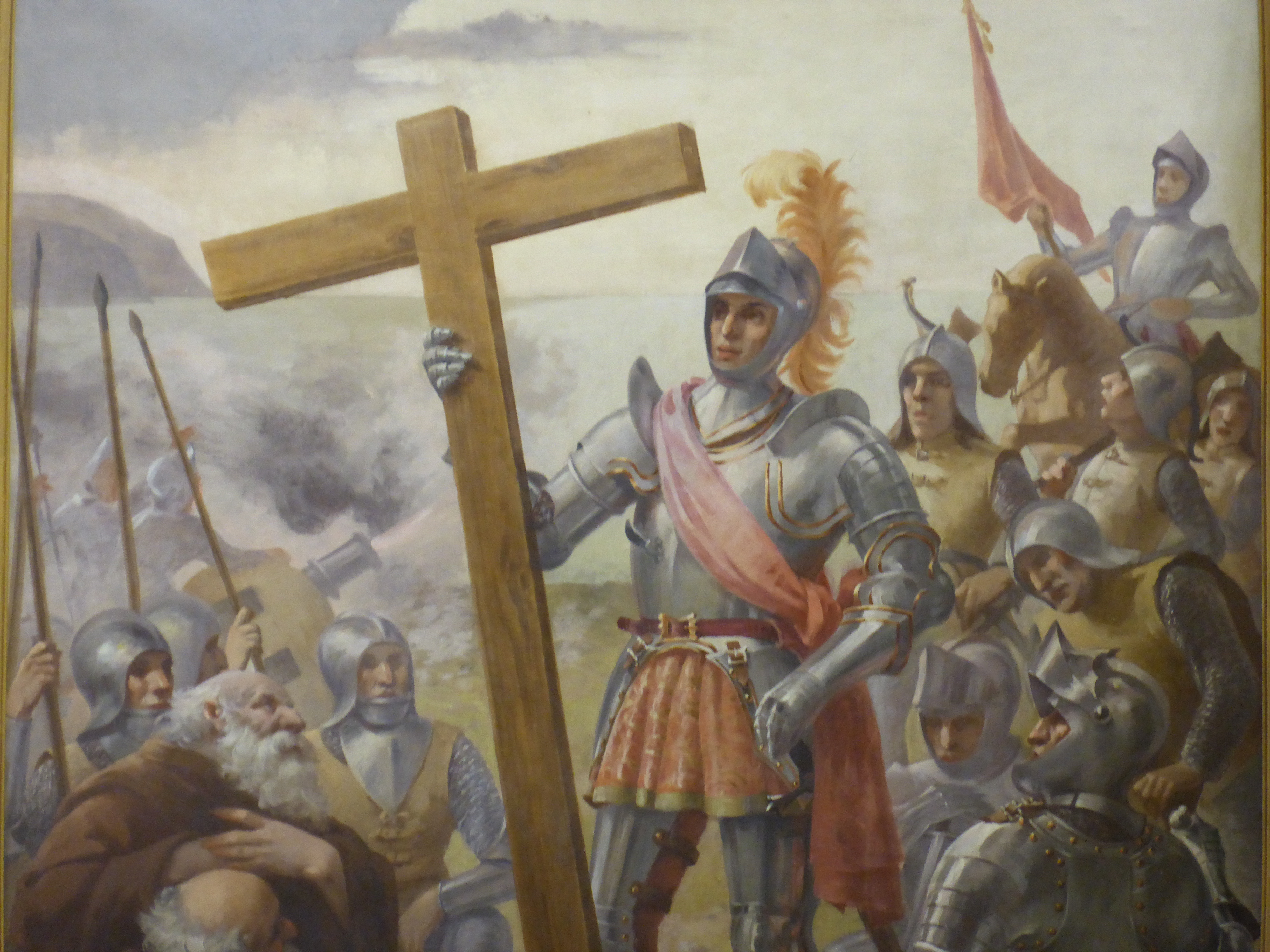 El pintor Manuel González Méndez realizó esta obra en el año 1906, firmándola M. G. Méndez. "Fundación de Santa Cruz de Tenerife" es una pintura de género histórico, que recrea la fundación en 1494. Se encuentra en la sede del Parlamento de Canarias, calle Teobaldo Power, 7, de Santa Cruz de Tenerife.